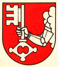 Wappen von Chavannes-sur-Moudon Kanton Waadt Schweiz